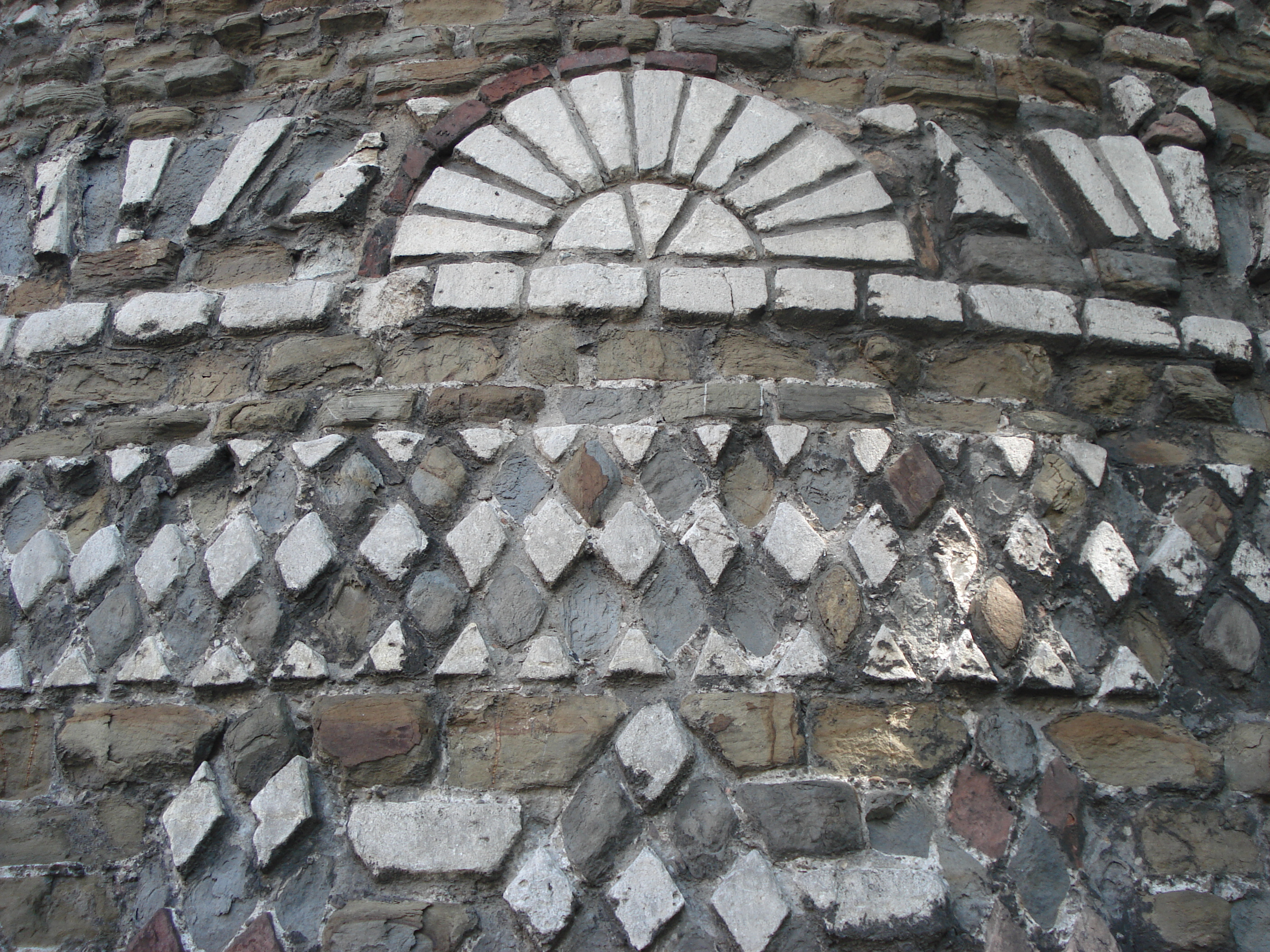 Eckturm der nordwestlichen Stadtmauer Kölns, erbaut von der damaligen römischen Kolonie Colonia Claudia Ara Agrippinensium (dem heutigen Köln) im 2. und 3. Jahrhundert n. Chr. -- Seitenansicht